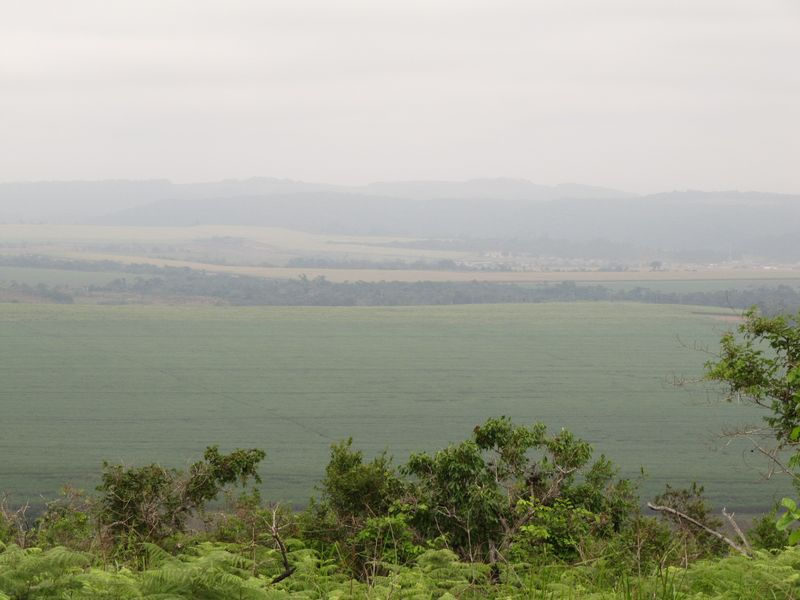 Plantation de canne à sucre, région de Franceville, Gabon 2010